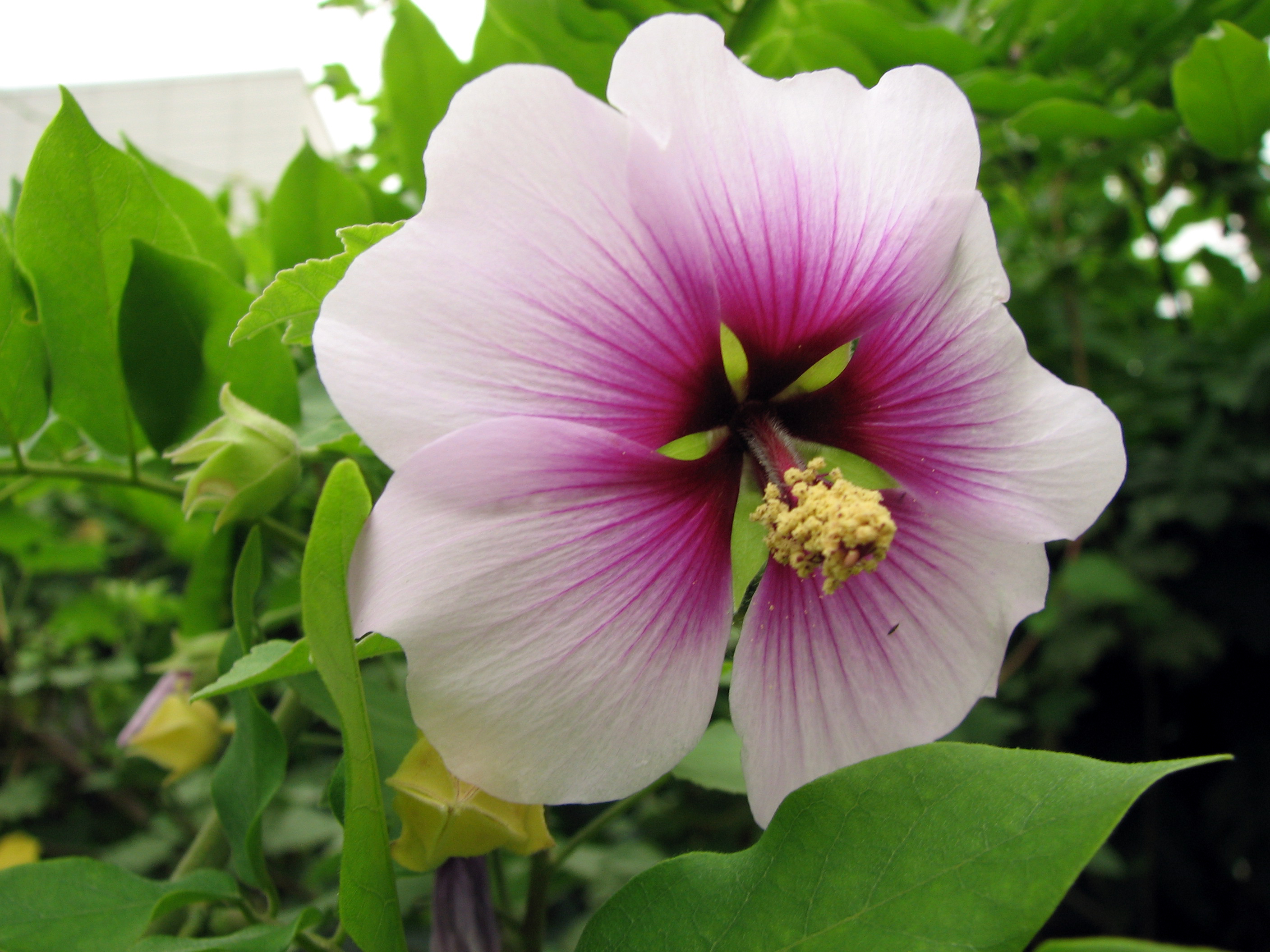 Lavatera maritima